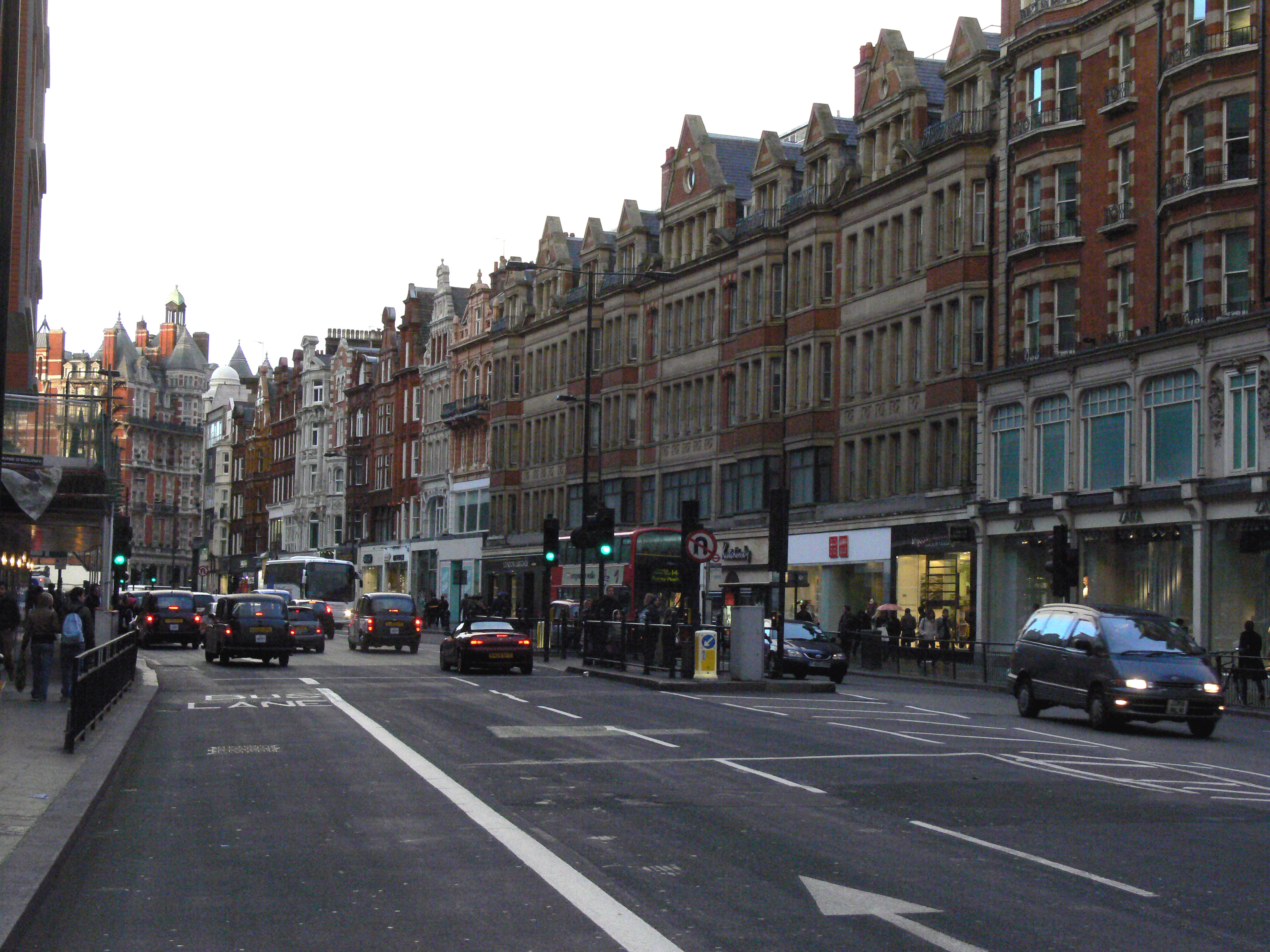 Knightsbridge